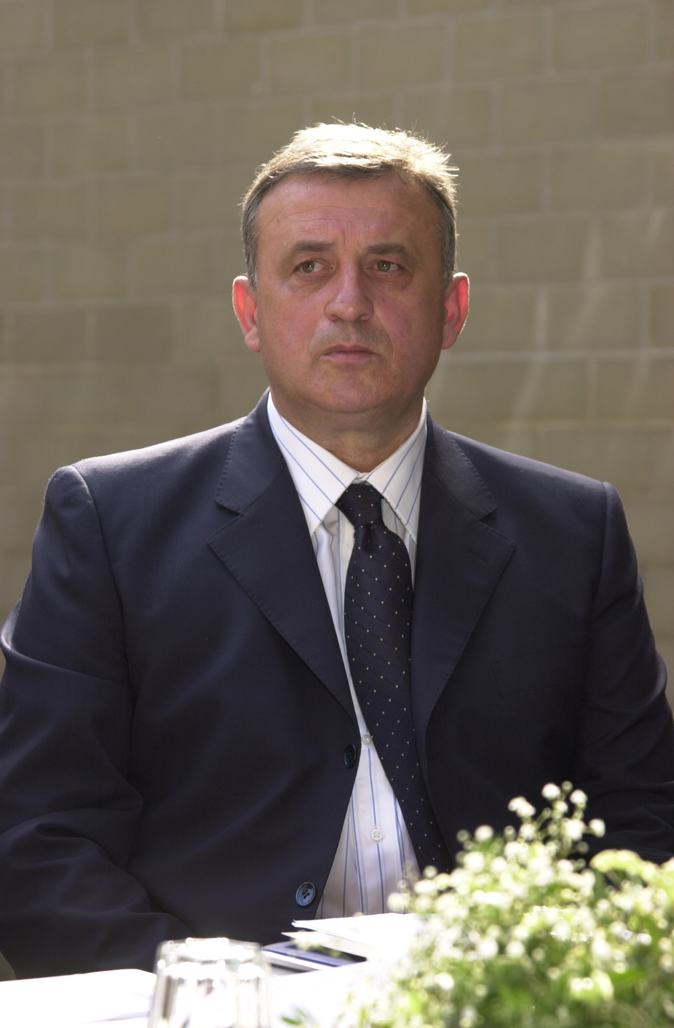 carlo starnazzi